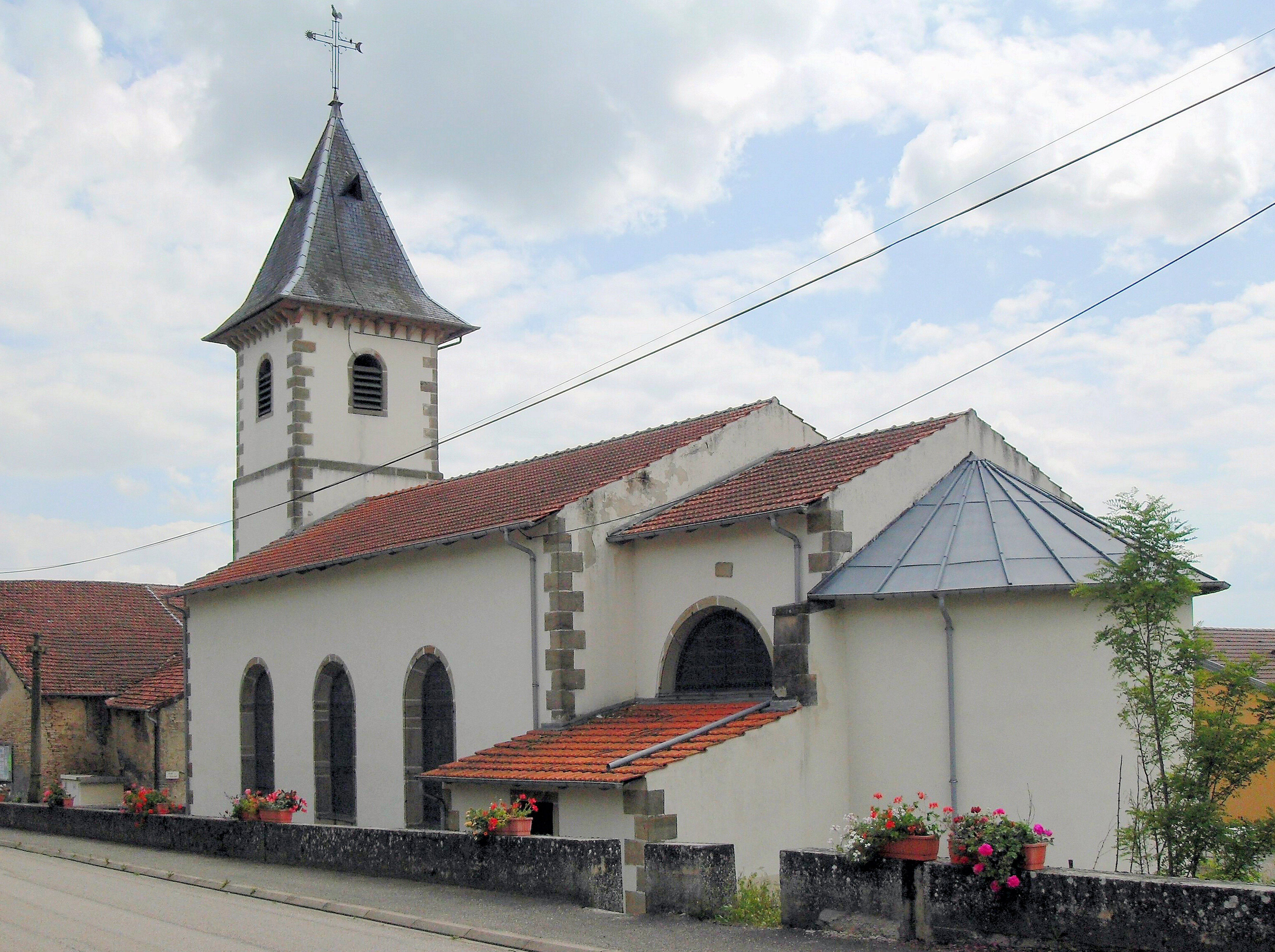 L'église Saint-Quirin d'Ahéville